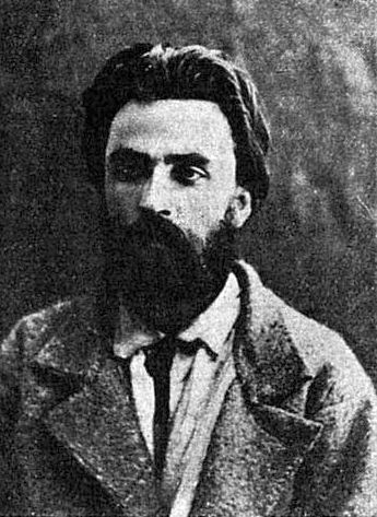 Дебогорий-Мокриевич Владимир Карпович (1848—1926)- деятель революционного движения в России, мемуарист